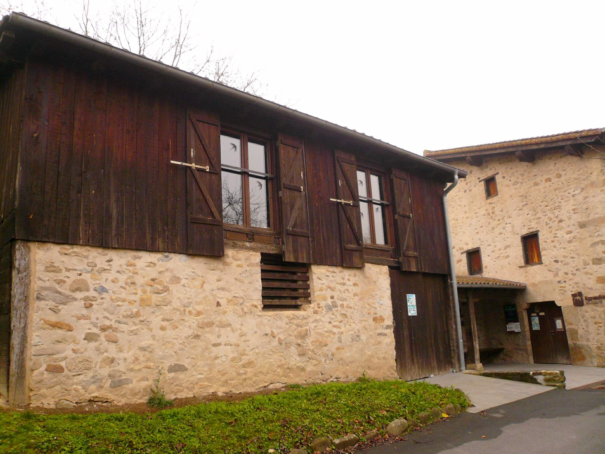 El Museo Barandiaran, en el Barrio de San Gregorio de Ataun (Guipúzcoa)